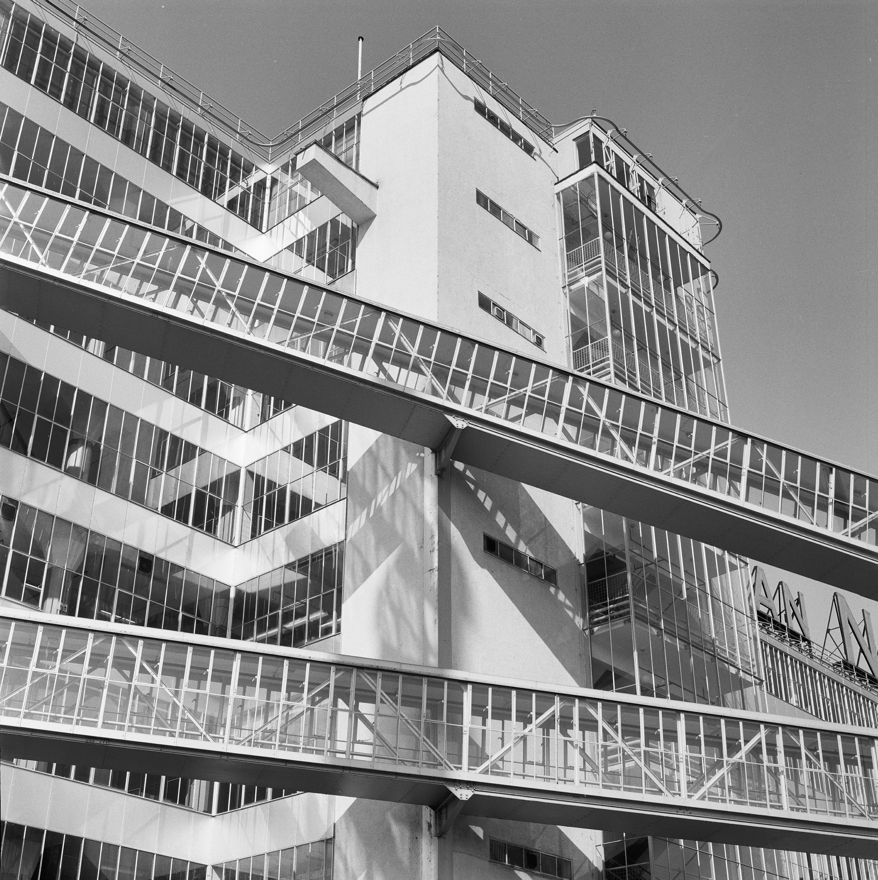 (voormalige) Van Nellefabriek, - Fabriekscomplex: Exterieur luchtbruggen komend uit de tabaksfabriek richting expeditiegebouw (Schiegebouw)